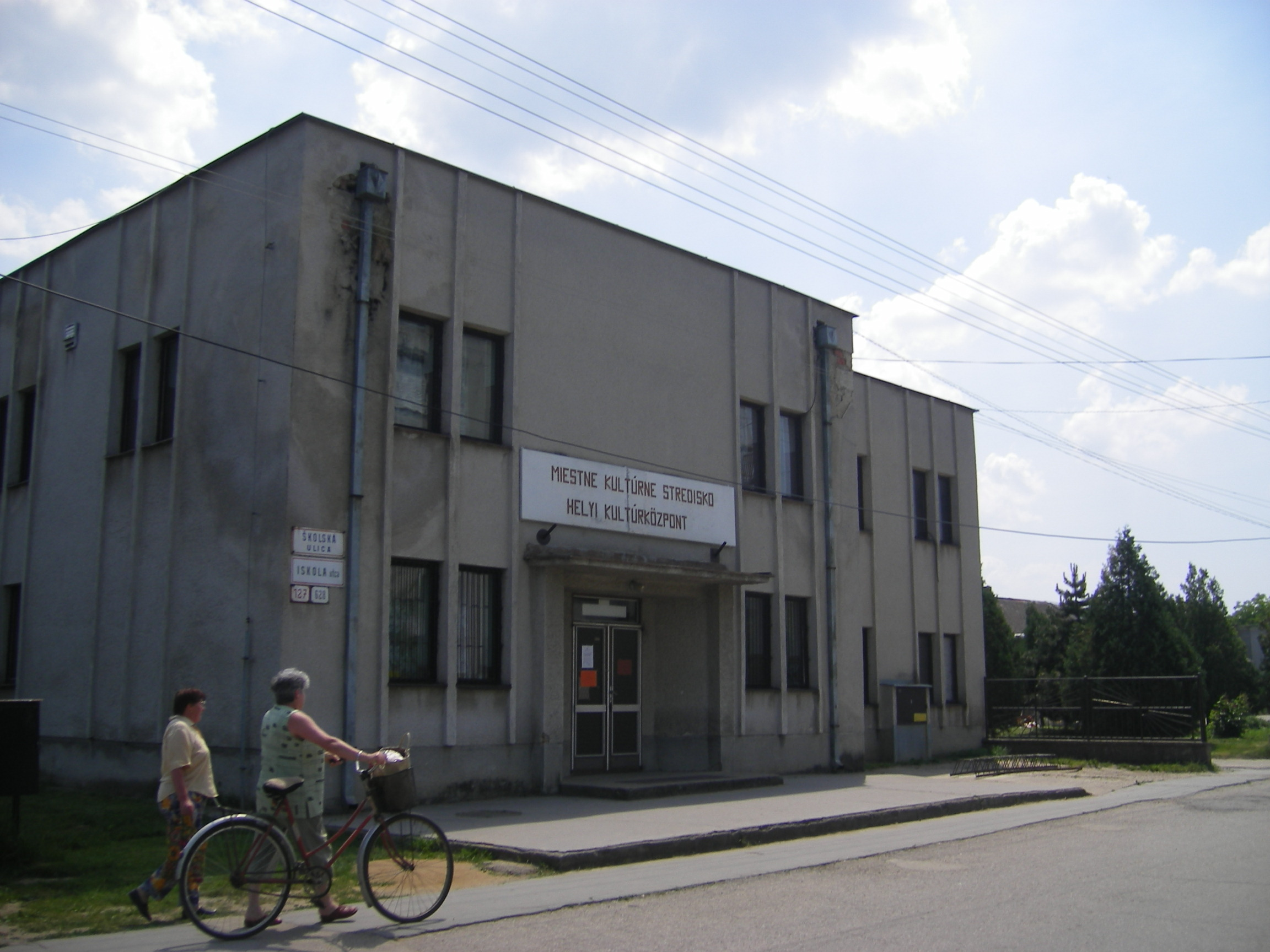 Perbete